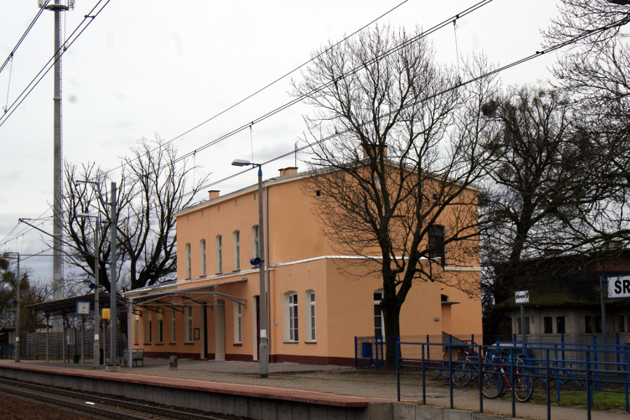 Budynek dworcowy w Środzie Śląskiej od strony peronów po odnowieniu elewacji w grudniu 2014 r.